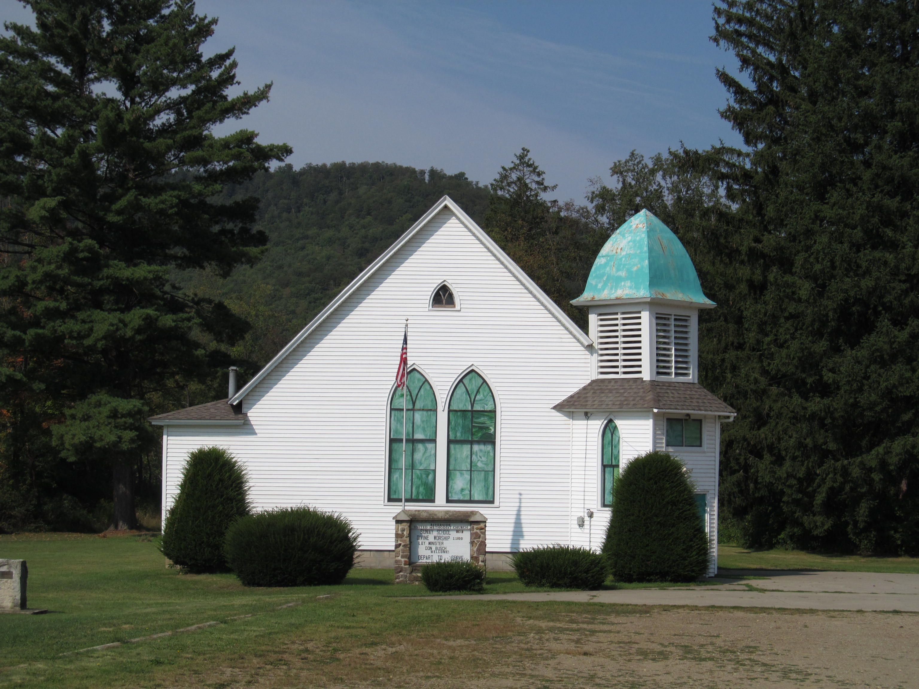 Roulette, Pennsylvania